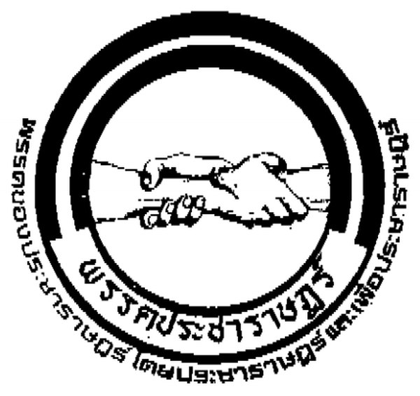 ตราสัญญลักษณ์ พรรคประชาราษฎร์ (2525)